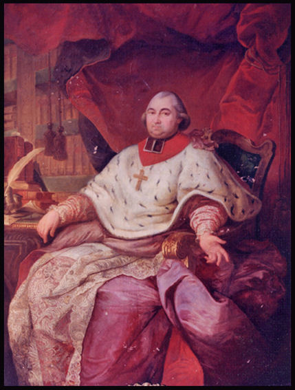 Portrait of François-Antoine de Méan (1756-1831)